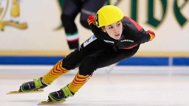 Anna Seidel Shorttrack Germany